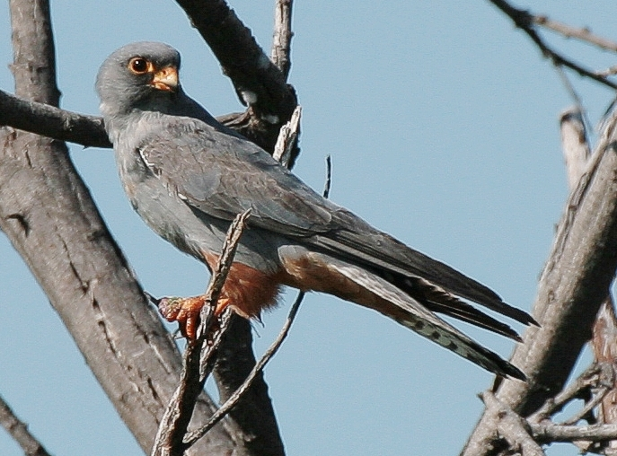 Männlicher Rotfußfalke im Etosha Nationalpark